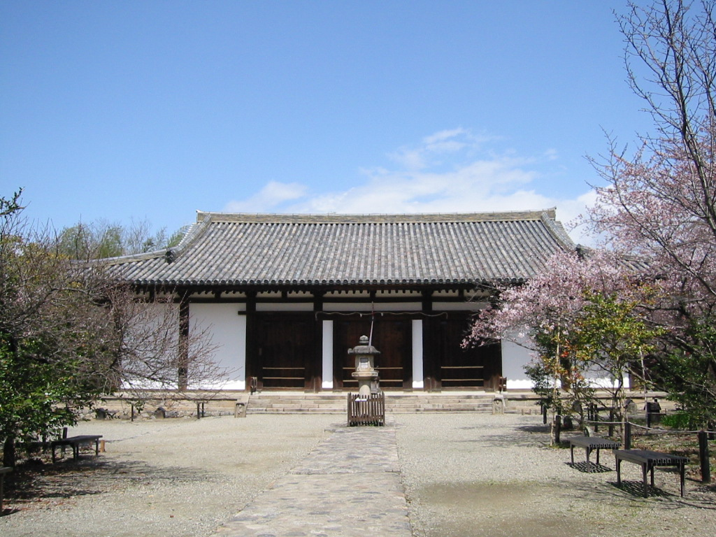 新薬師寺 本堂 (奈良市) 2002年3月23日撮影 撮影日：2002年3月23日 撮影者：Dddeco